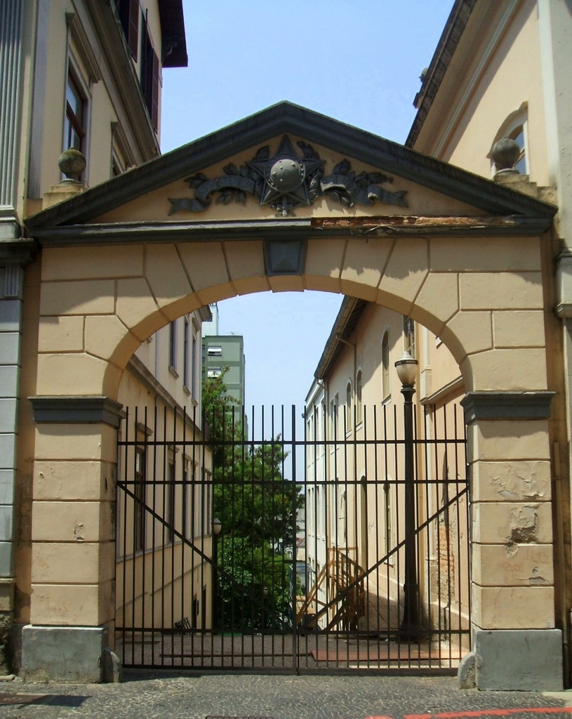 Beco do Pinto, no centro histórico de São Paulo, Brasil